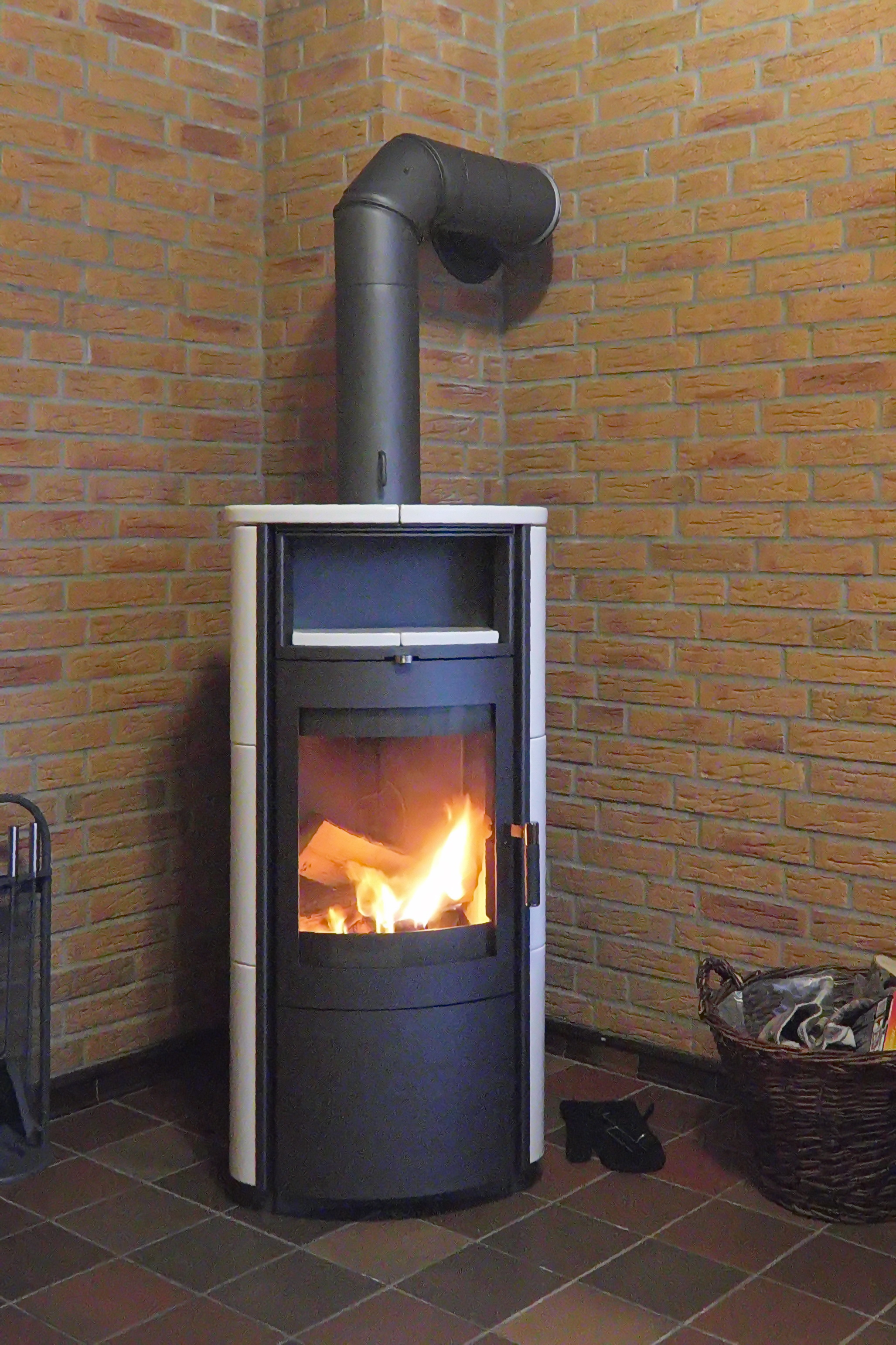 Moderner Kaminofen in Betrieb.